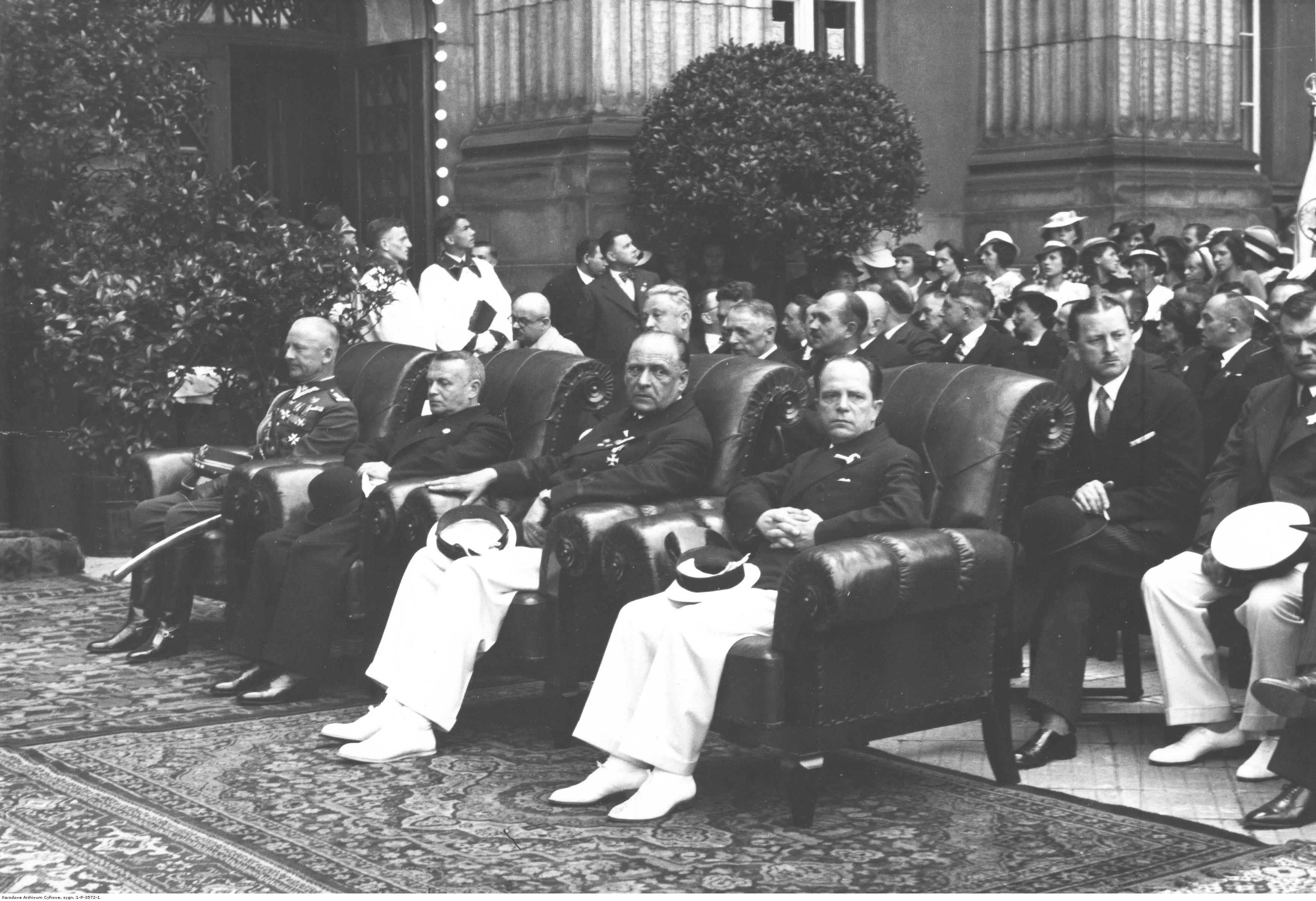 Obchody Święta Morza w Katowicach. Przedstawiciele władz podczas Mszy Św. Widoczni m.in.: pułkownik Władysław Powierza (1. z lewej), wojewoda śląski Michał Grażyński (2. z lewej w pierwszym rzędzie), wicewojewoda śląski Tadeusz Saloni (1. z prawej w pierwszym rzędzie). Koncern Ilustrowany Kurier Codzienny - Archiwum Ilustracji. Sygnatura: 1-P-3572-1